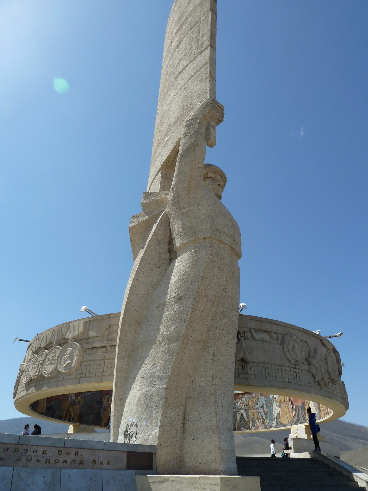 A szovjet emlékmű a város melletti dombon (Soviet monument on a hill near the city)